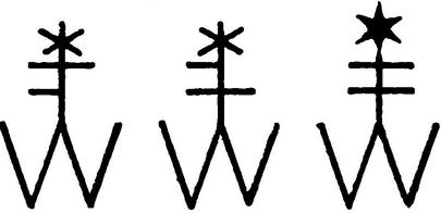 Печати бояр Велавских (Михаила, Теодора, Семёна Ивановичей Шишек Ставецких) и герб Солтан, 1585 г., Zb. W. R.